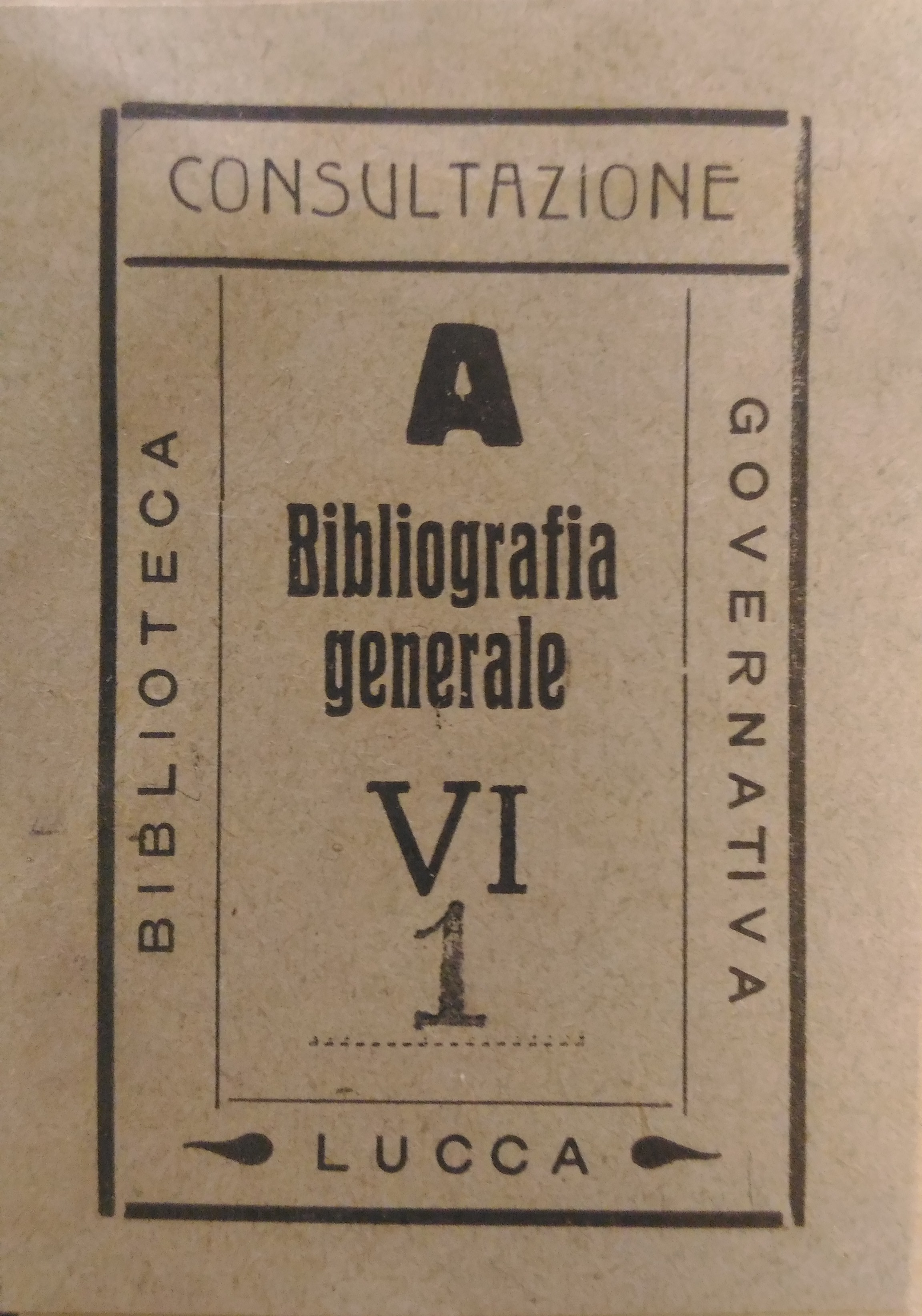 Etichetta che segna la collocazione fisica di un libro all'interno di una biblioteca.